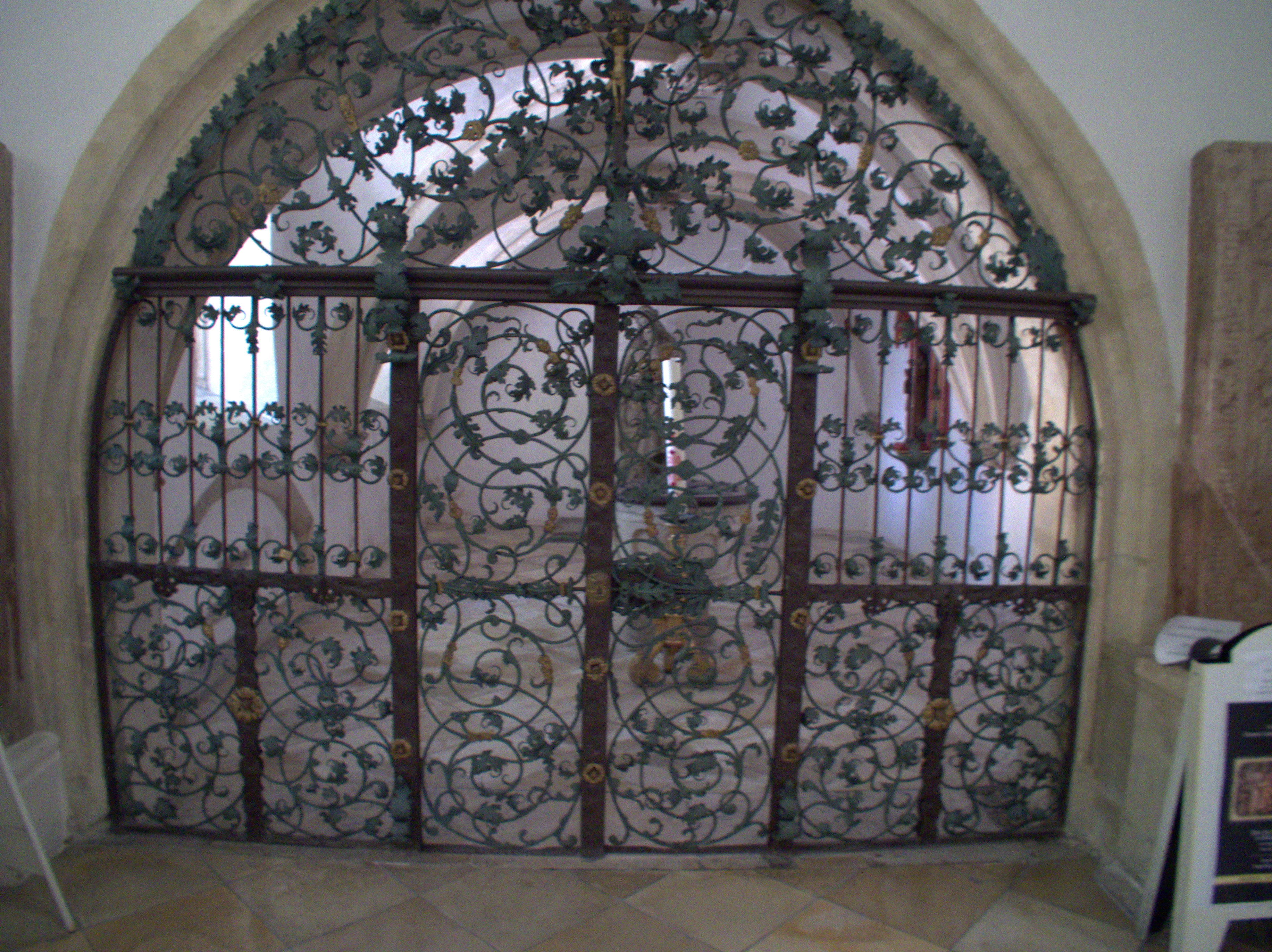 Alte Kapelle Regensburg - Vituskapelle: Gitter im Vorraum